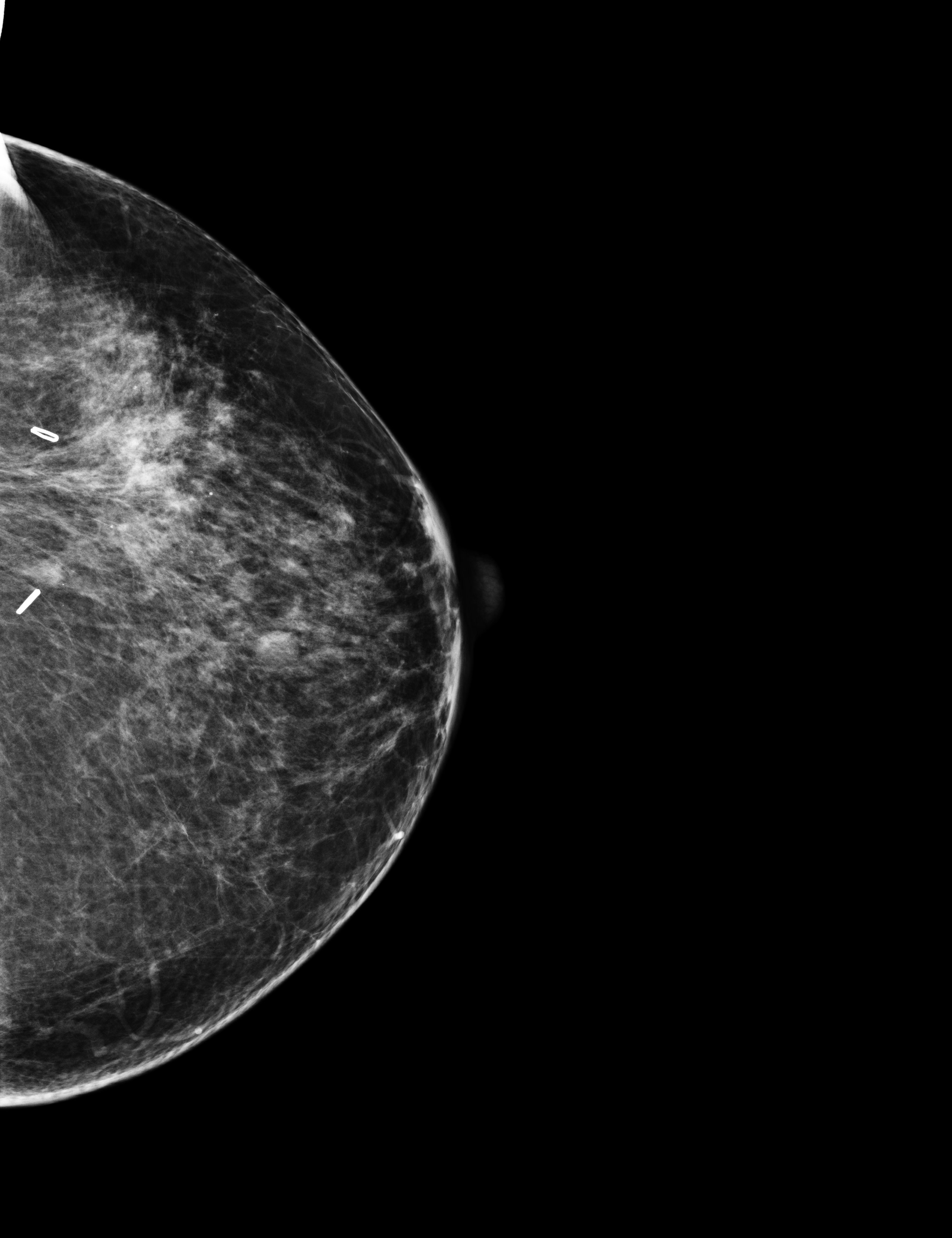 imagen original mamogafia